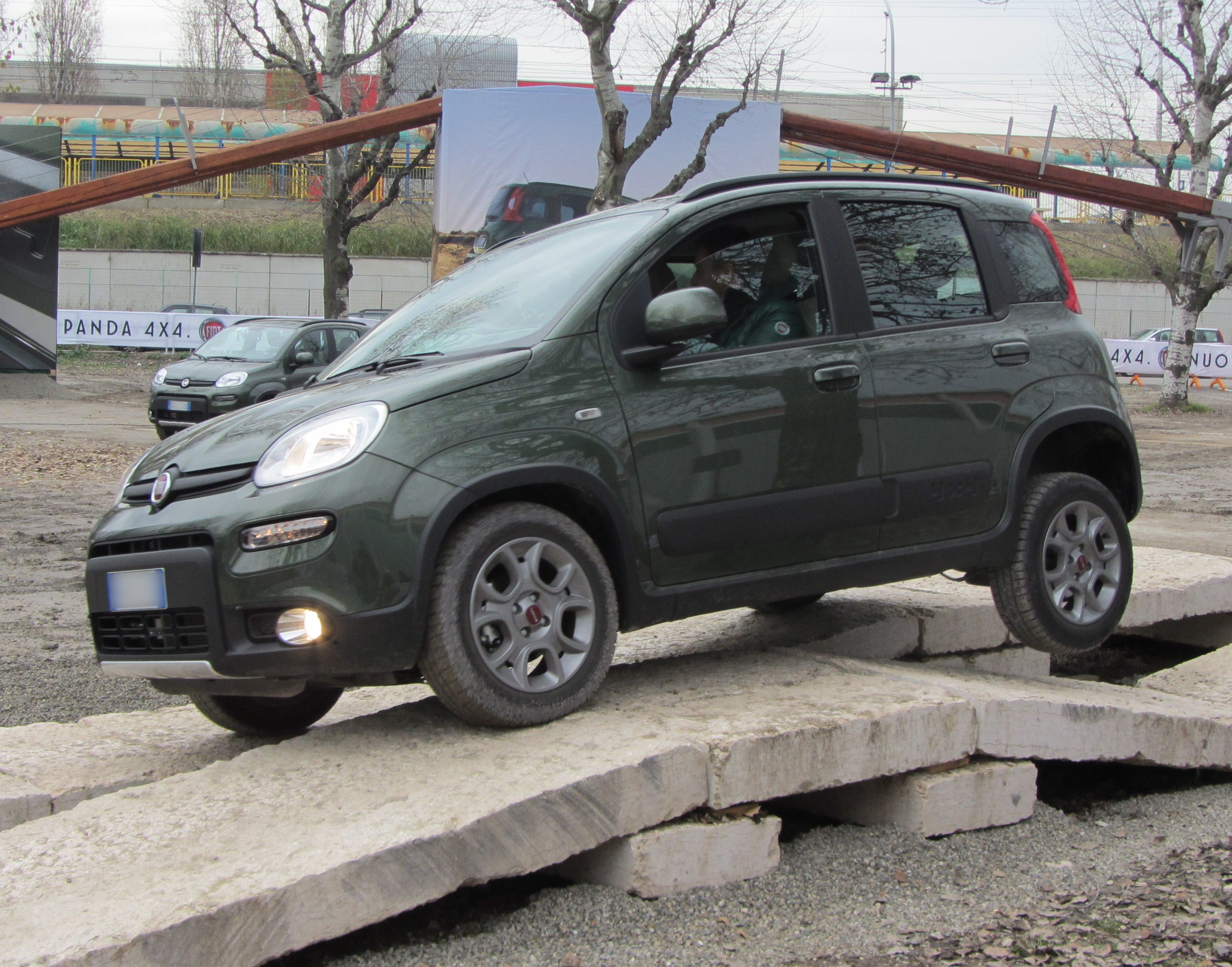 Panda 4x4